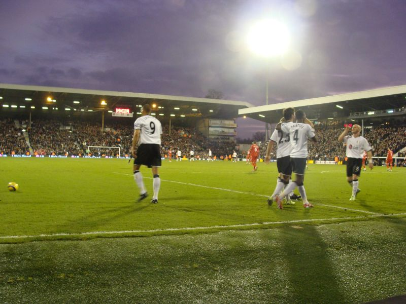 Fulham celebrate Dempsey's goal